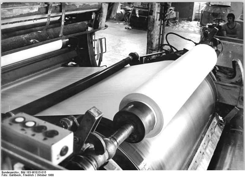 ADN-ZB-Gahlbeck-15.10.80-Bez. Leipzig: Zu 100 Prozent aus Altrohstoffen besteht das Druck- und Schreibpapier AROS, das nach einer neuen Technologie hier im Werk Technitz des VEB Druck-und Spezialpapier Golzern hergestellt wird. Bei einer jährlichen Produktion von AROS-Papier im Umfang von 9 000 Tonnen, die im nächsten Jahr erreicht werden sollen, brauchen vergleichsweise 24 000 Festmeter Faserholz nicht eingeschlagen zu werden und bei der Aufbereitung 1 000 t Braunkohlebriketts weniger benötigt. -siehe auch W1015-13 und 14 N